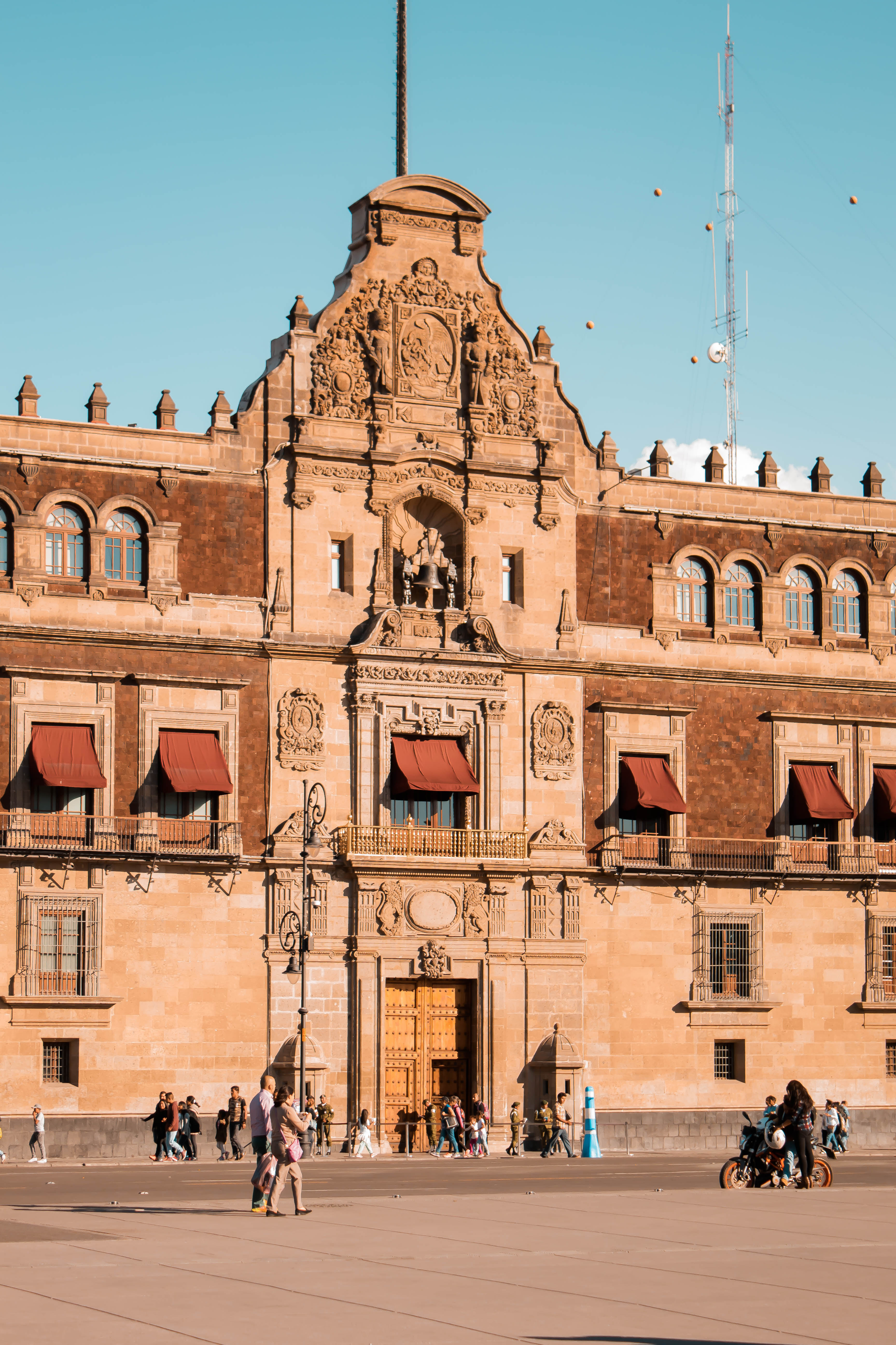 Detalle del cuerpo central, y principal de la fachada del Palacio Nacional. Tras la salida del pode de Enrique Peña Nieto, fueron retiradas todas las barreras que resguardaban el edificio.